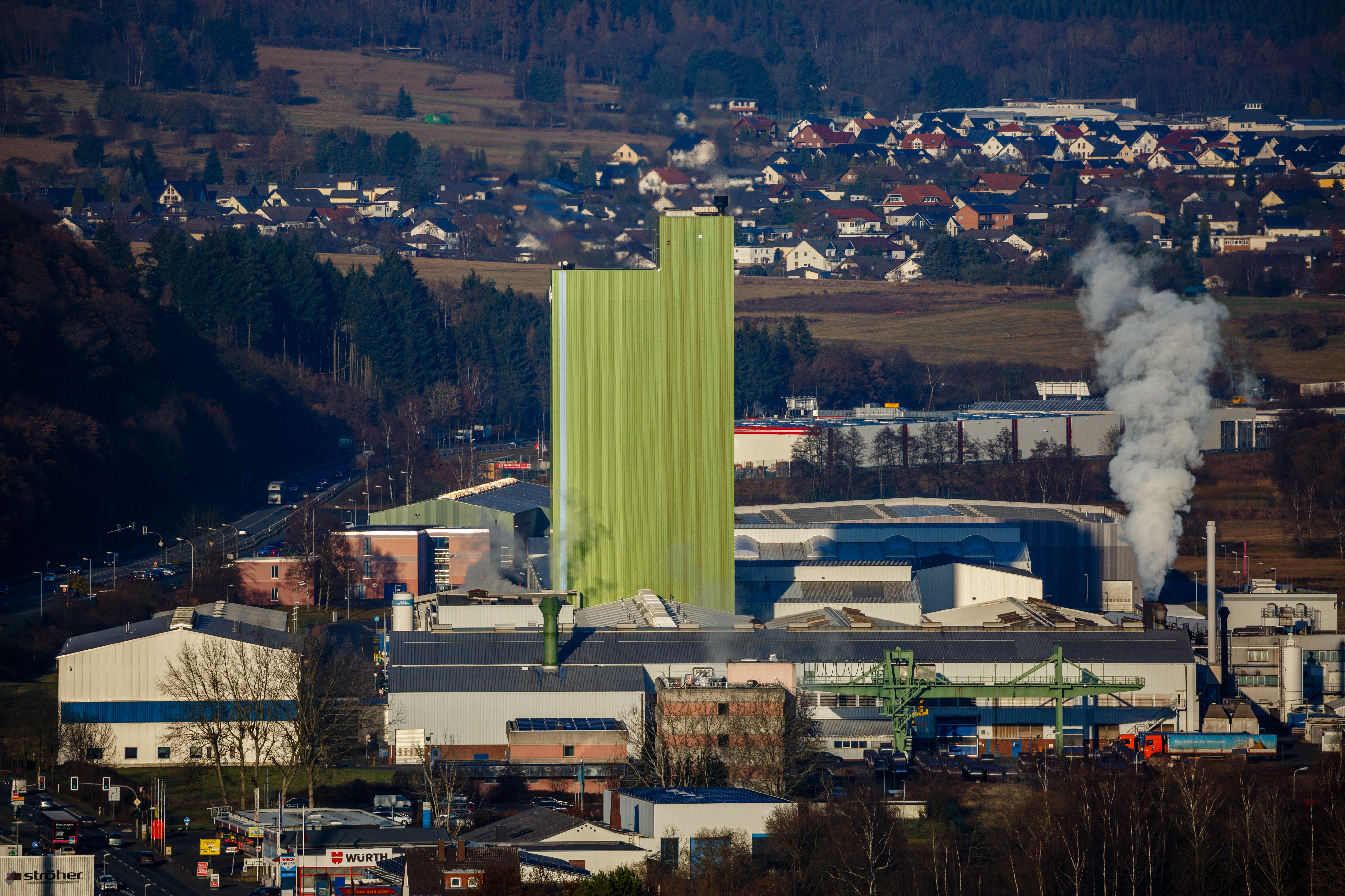 Outokumpu Nirosta, Werk im nördlichen Industriegebiet von Dillenburg